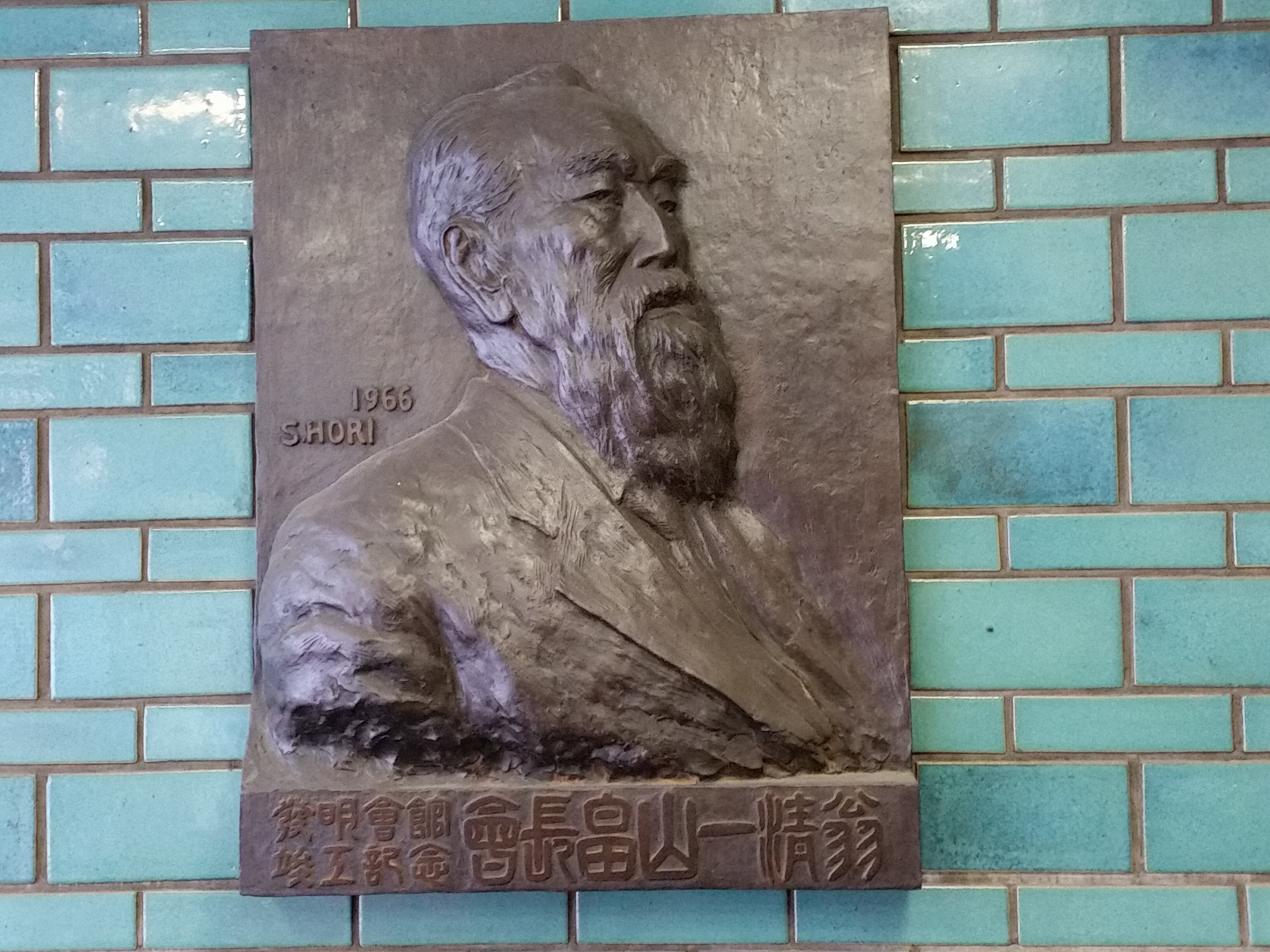 発明会館（港区虎ノ門）１Ｆロビーに設置。畠山一清は竣工当時の発明協会会長。